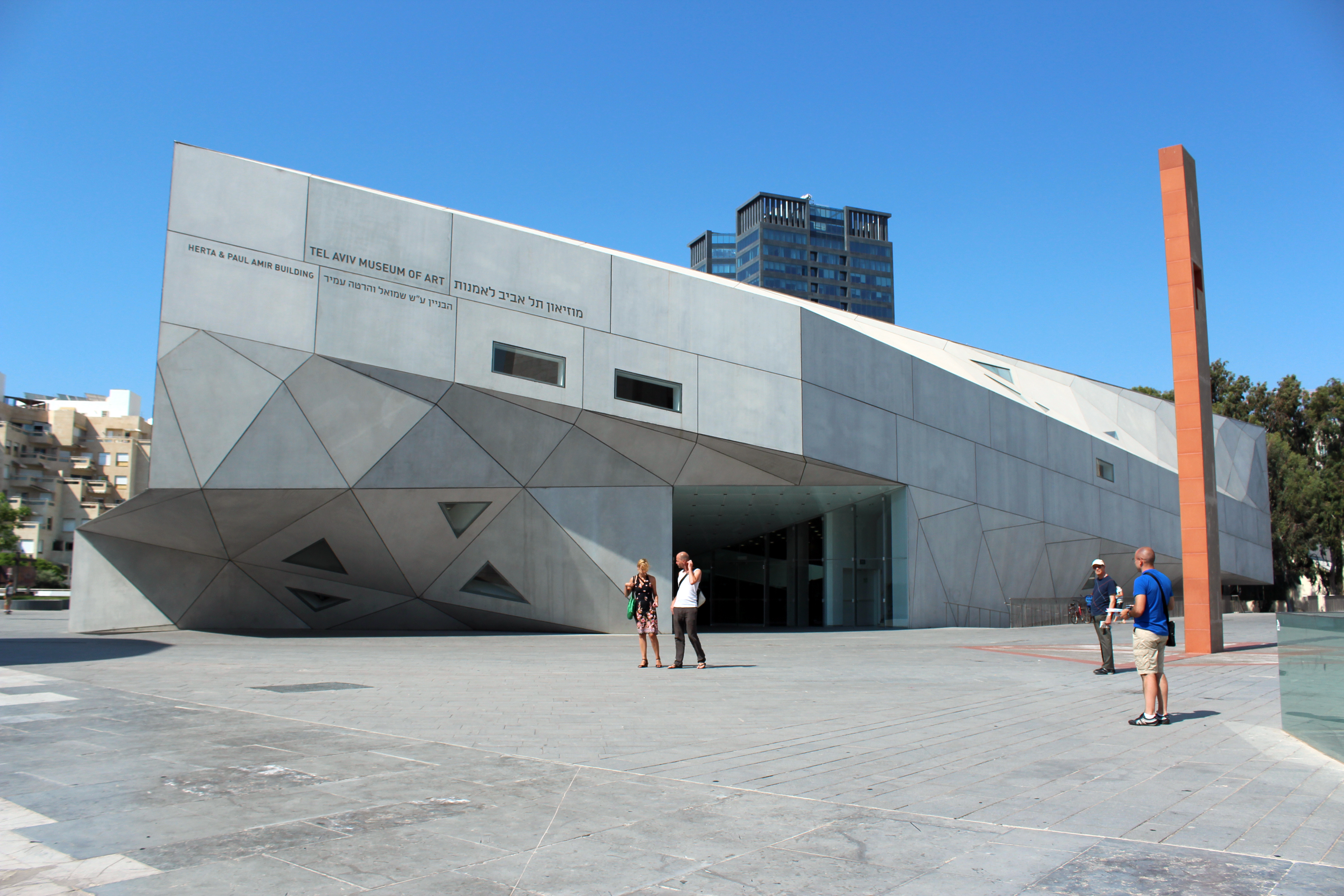 Tel Aviv-Yafo